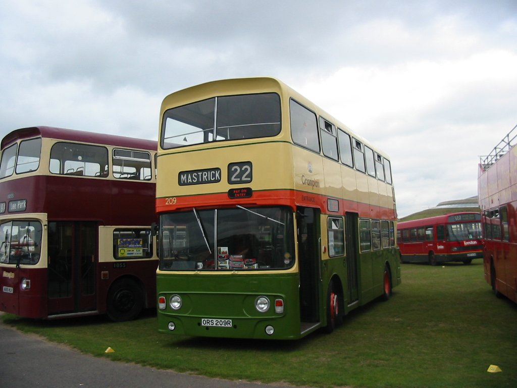 GRT 209 ORS209R 2004-09-26